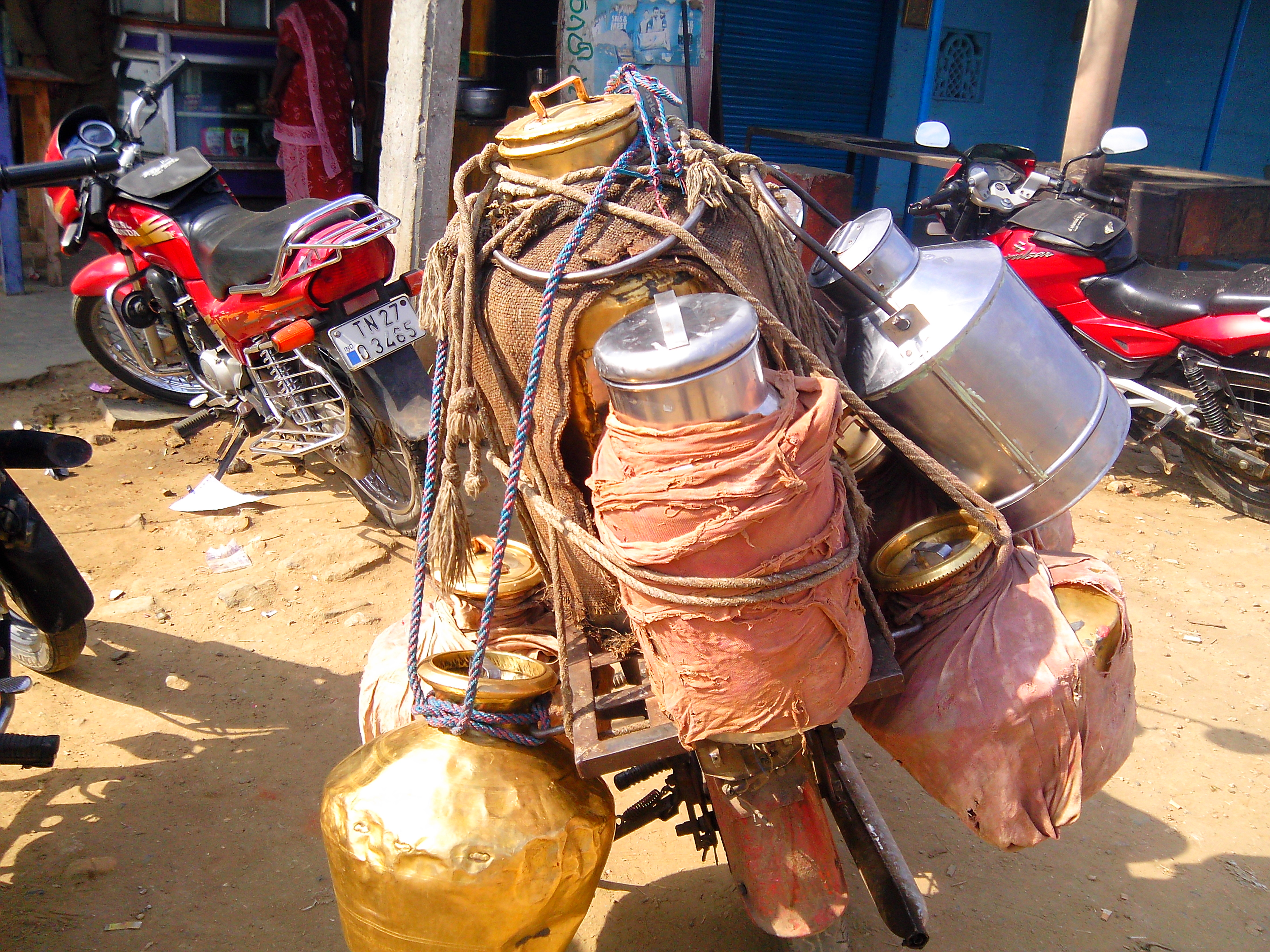 சேலத்தில் பால் வண்டி. Milk transportation in Salem.